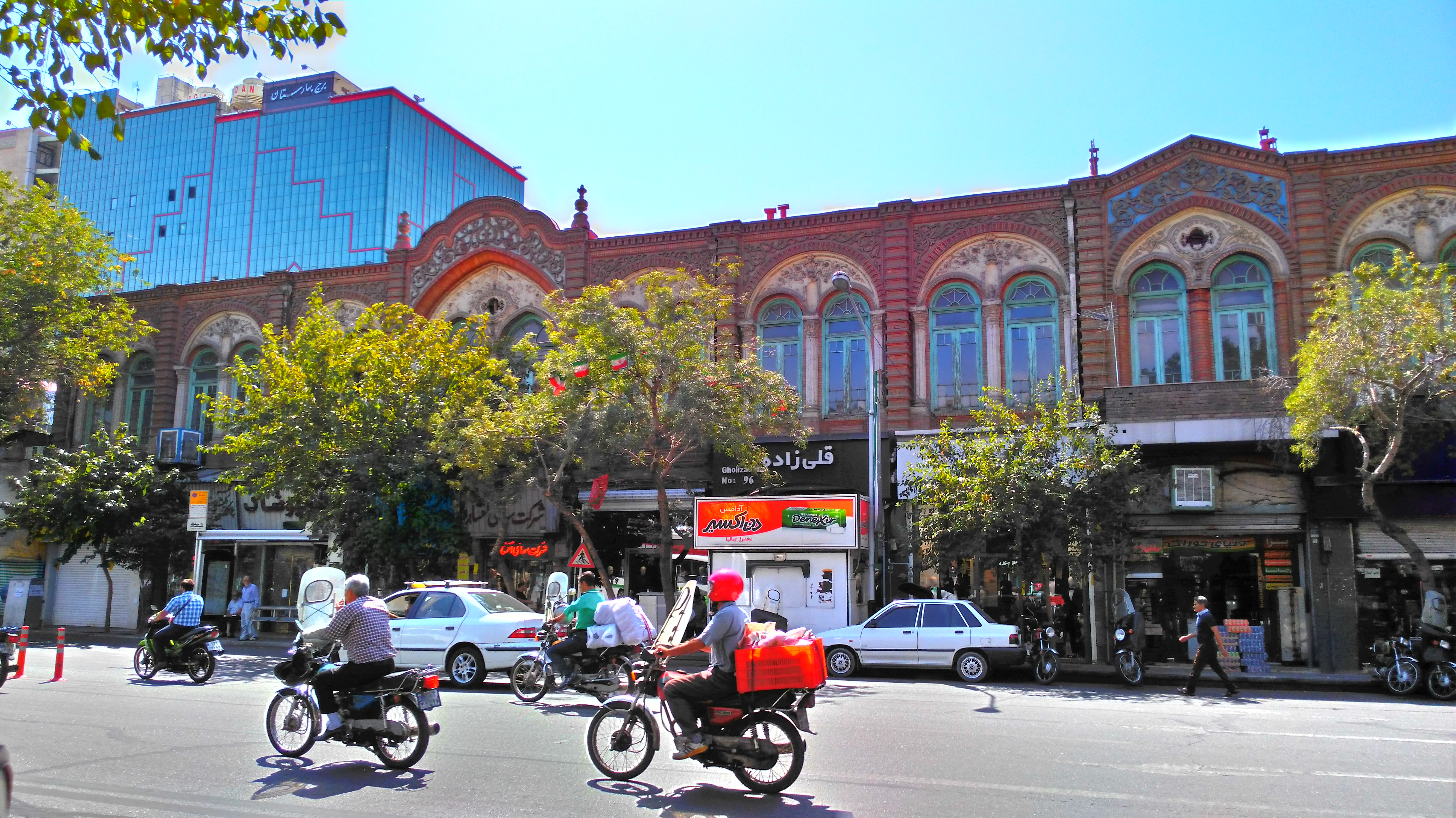 ساختمان شرکت سهامی انتشار